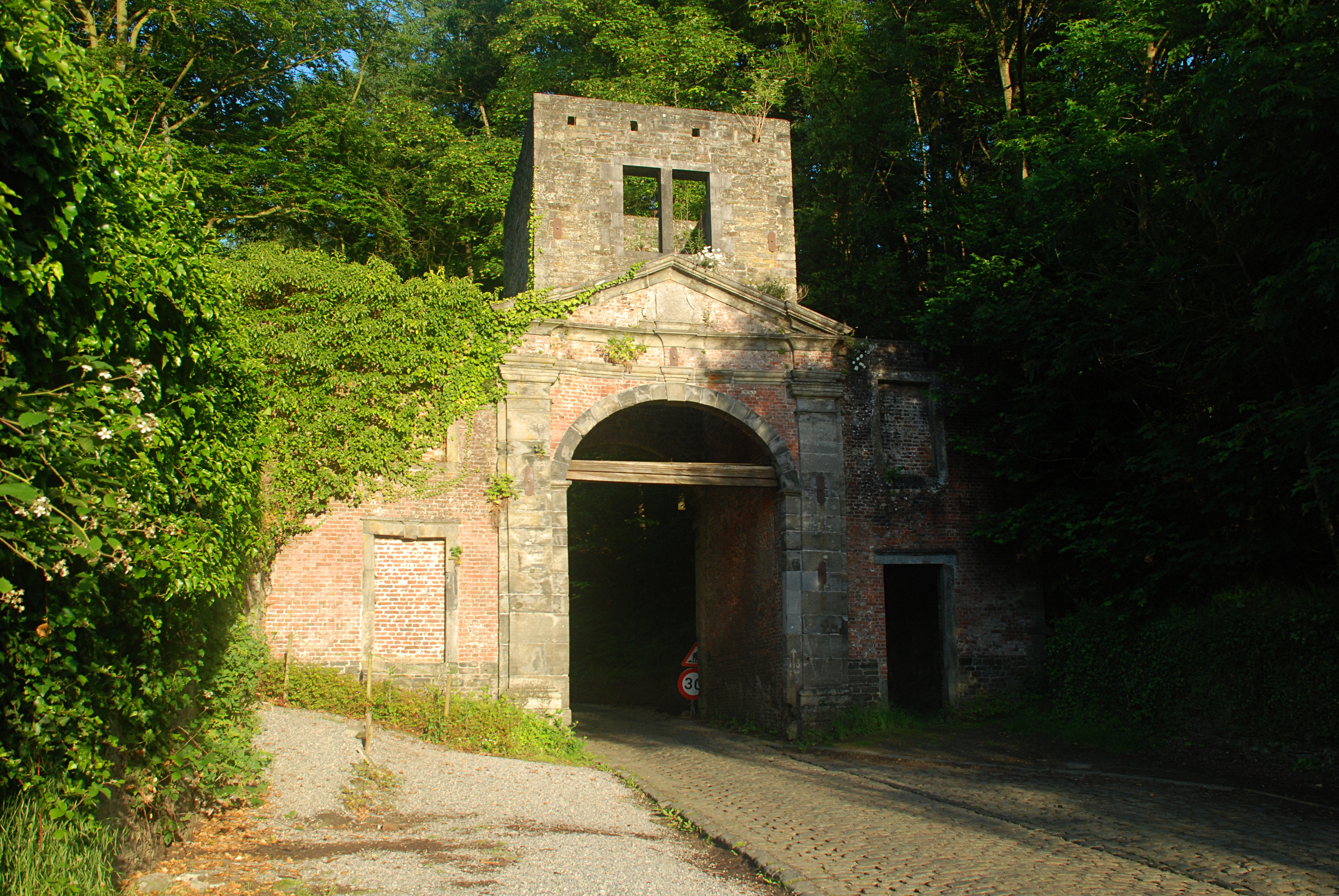 Belgique - Brabant wallon - Villers-la-Ville - Porte de Namur